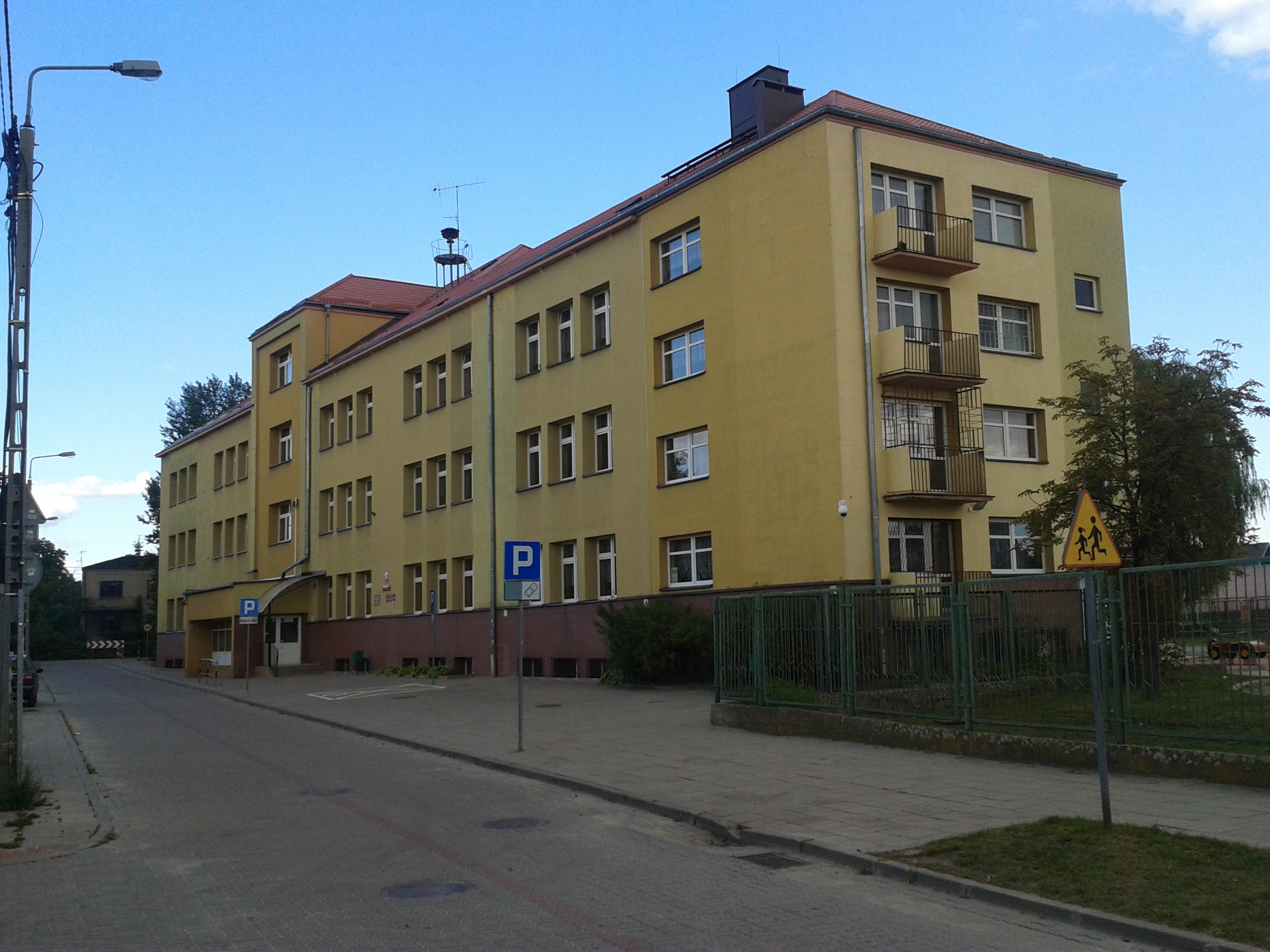 Białystok, Szkoła Podstawowa i Gimnazjium przy ul.Jesiennej